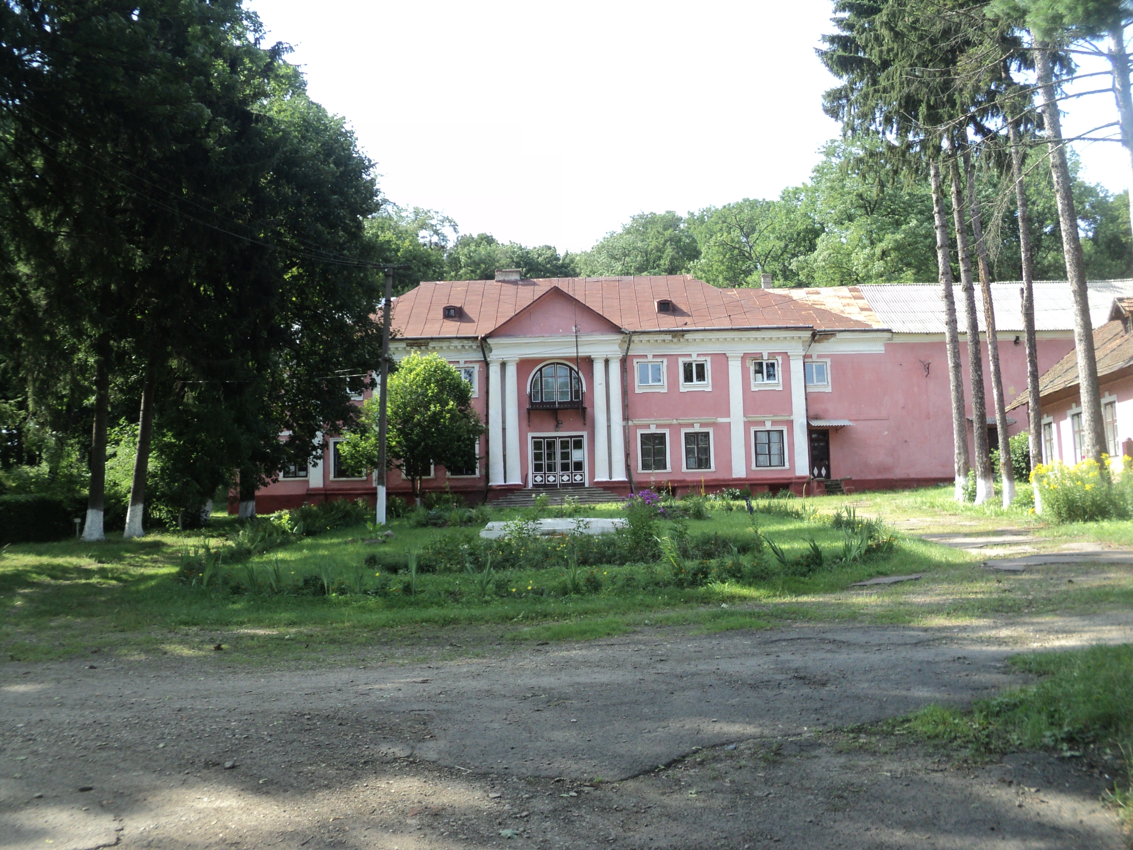 село Крукеничи (Украина), панская усадьба, 2012